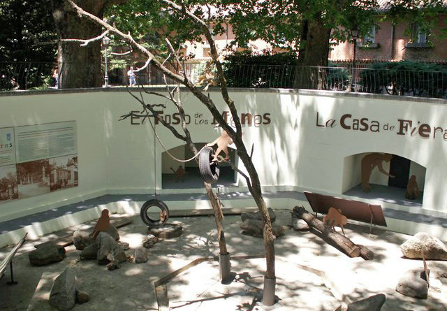 "Foso de los monos", creo recordar que eran mandriles, de la antigua Casa de Fieras del Retiro, en el Parque del Buen Retiro, actualmente Jardines del arquitecto Herrero Palacios.